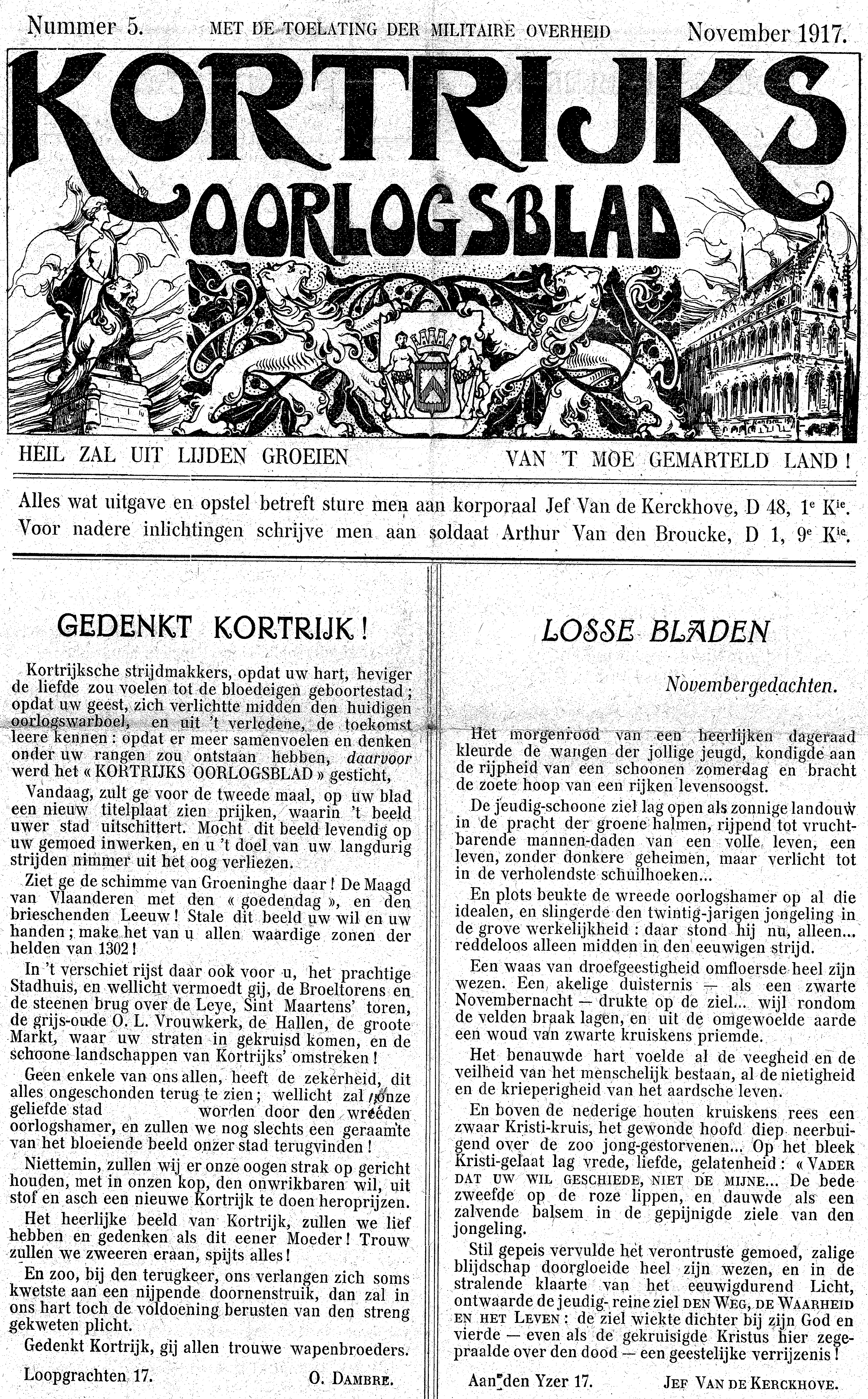 Voorpagina Kortrijks Oorlogsblad nummer 5 november 1917